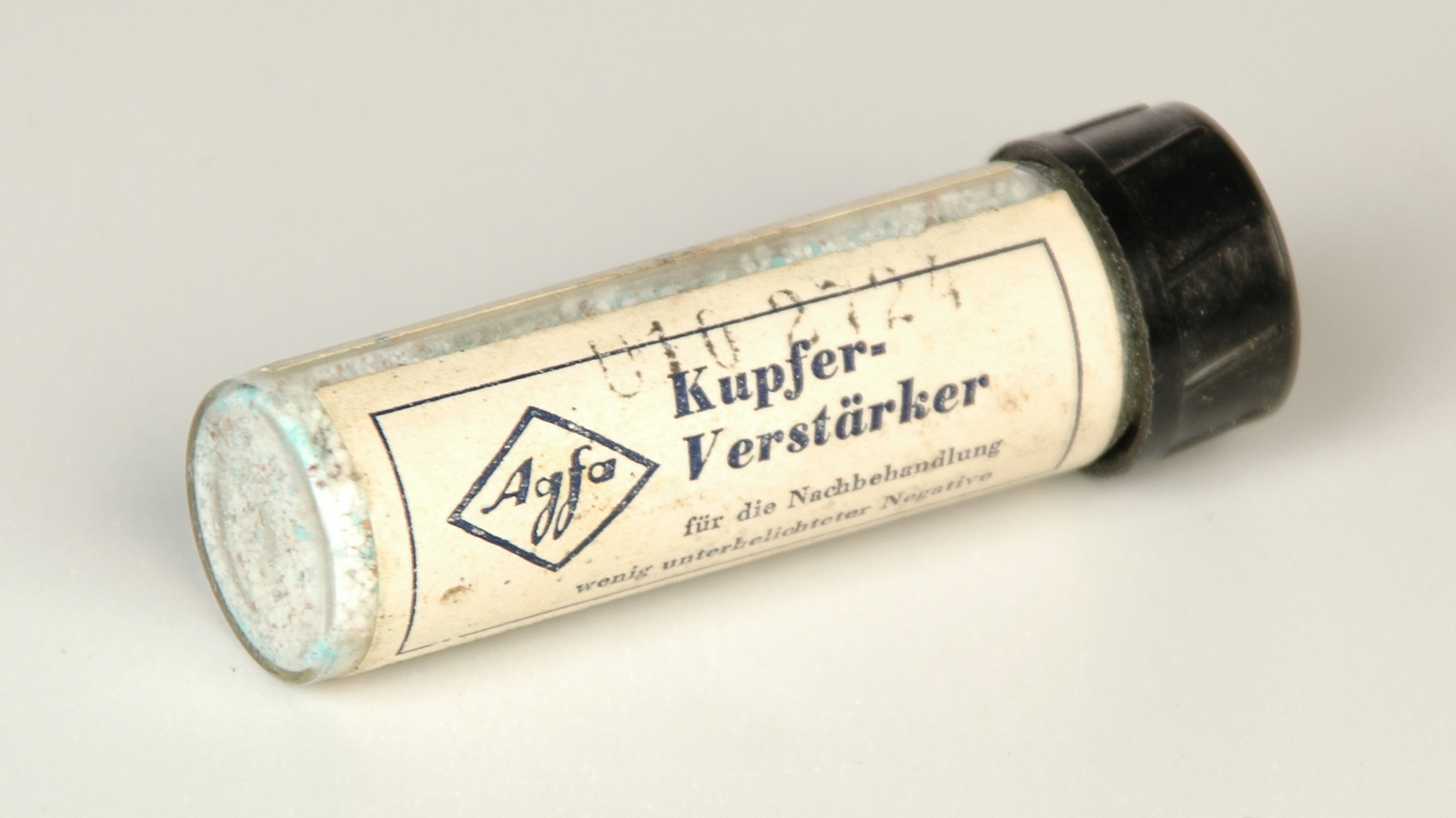 Retuschezubehör für analoge Fotografie Pulver zum Ansatz von einer Lösung